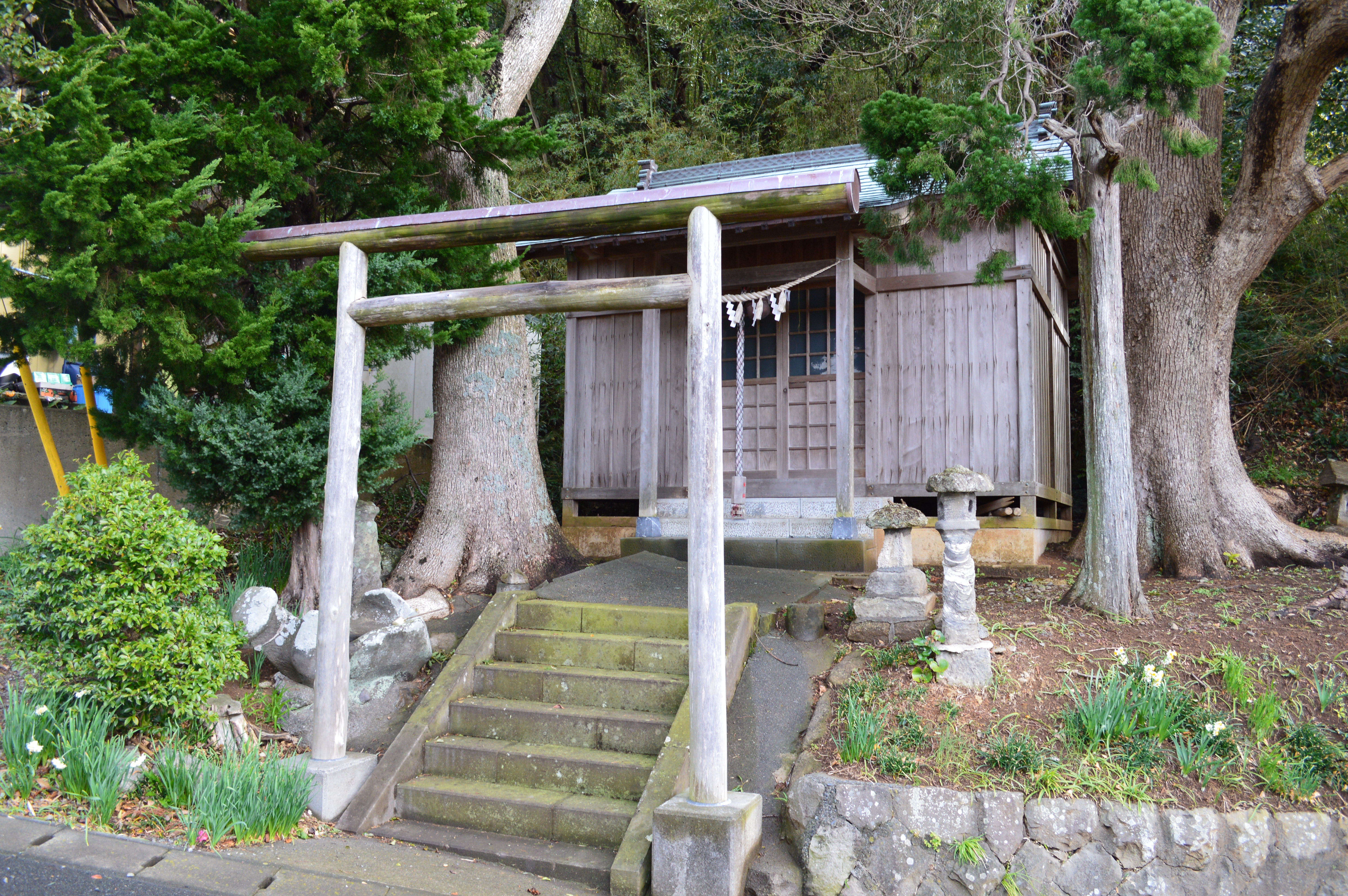 伊古奈比咩命神社境外末社 十二明神社